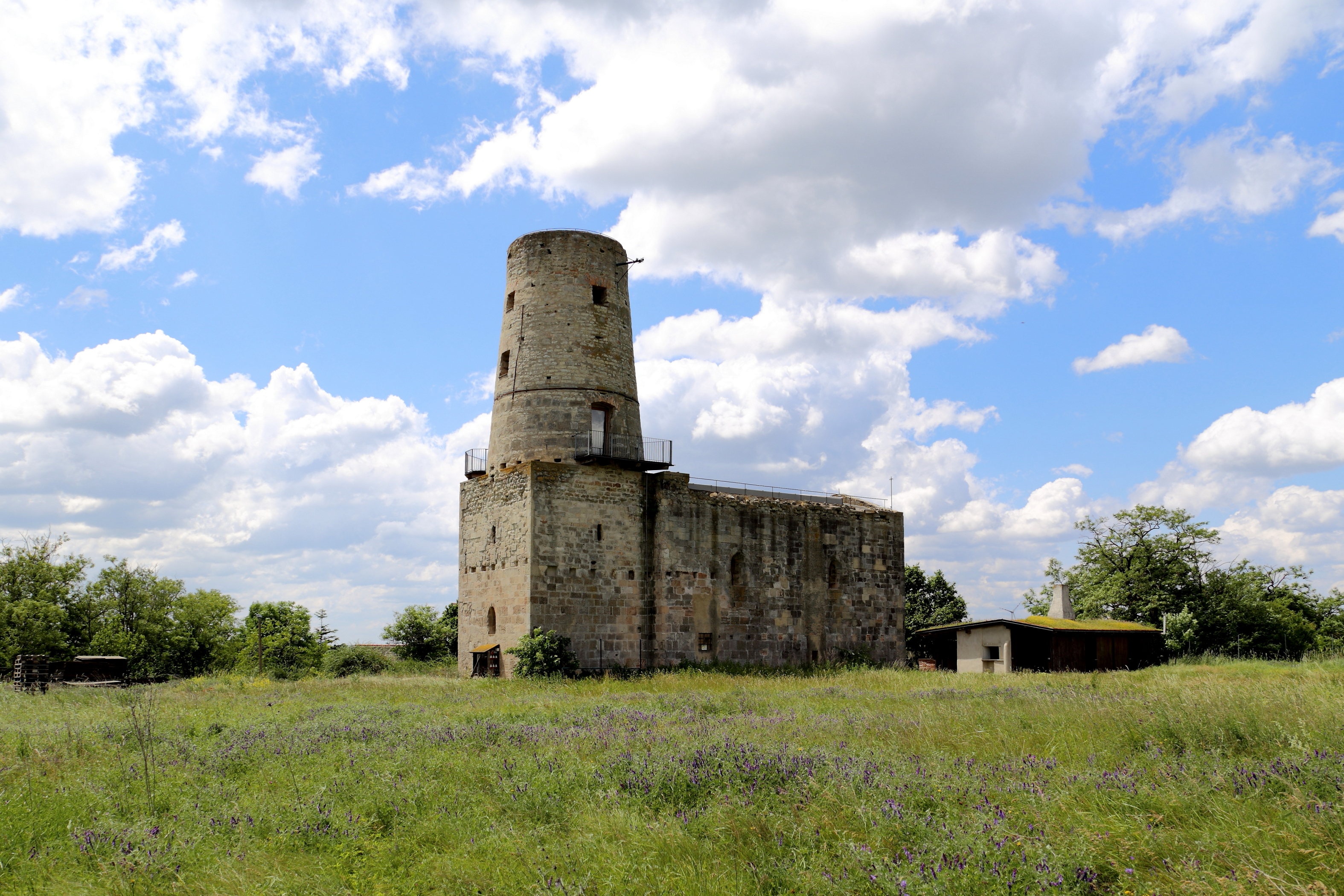 Nordostansicht der Kirchenruine hl. Martin in der niederösterreichischen Gemeinde Markgrafneusiedl. Die am nordöstlichen Ortausgang in beherrschender Höhenlage errichtete (Ende des 12. Jahrhunderts) ehemalige Wehrkirche wurde 1574 als Wallfahrtskirche bezeichnet und 1683 urkundlich als Ruine genannt. Bei der Schlacht bei Wagram 1809 diente sie den Österreichern unter Erzherzog Karl als Kommandositz. 1817 wird sie zu einer Windmühle mit dominierendem Rundturm umgebaut und brannte 1862 aus.